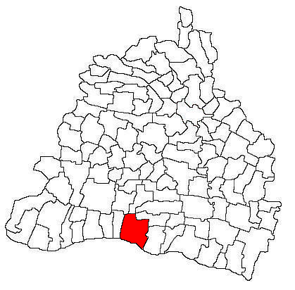 Amplasarea în cadrul județului.